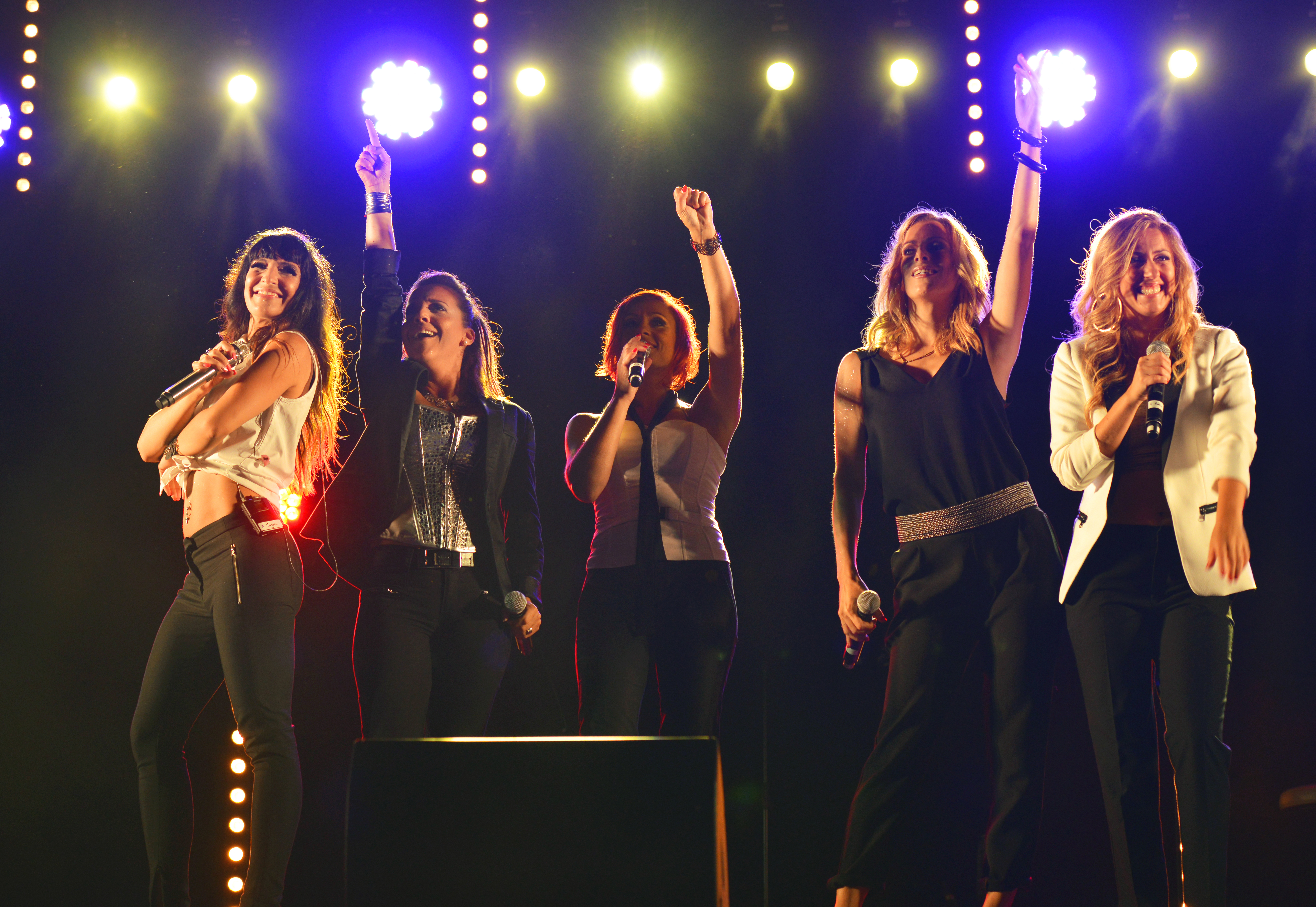 NEW L5 AL